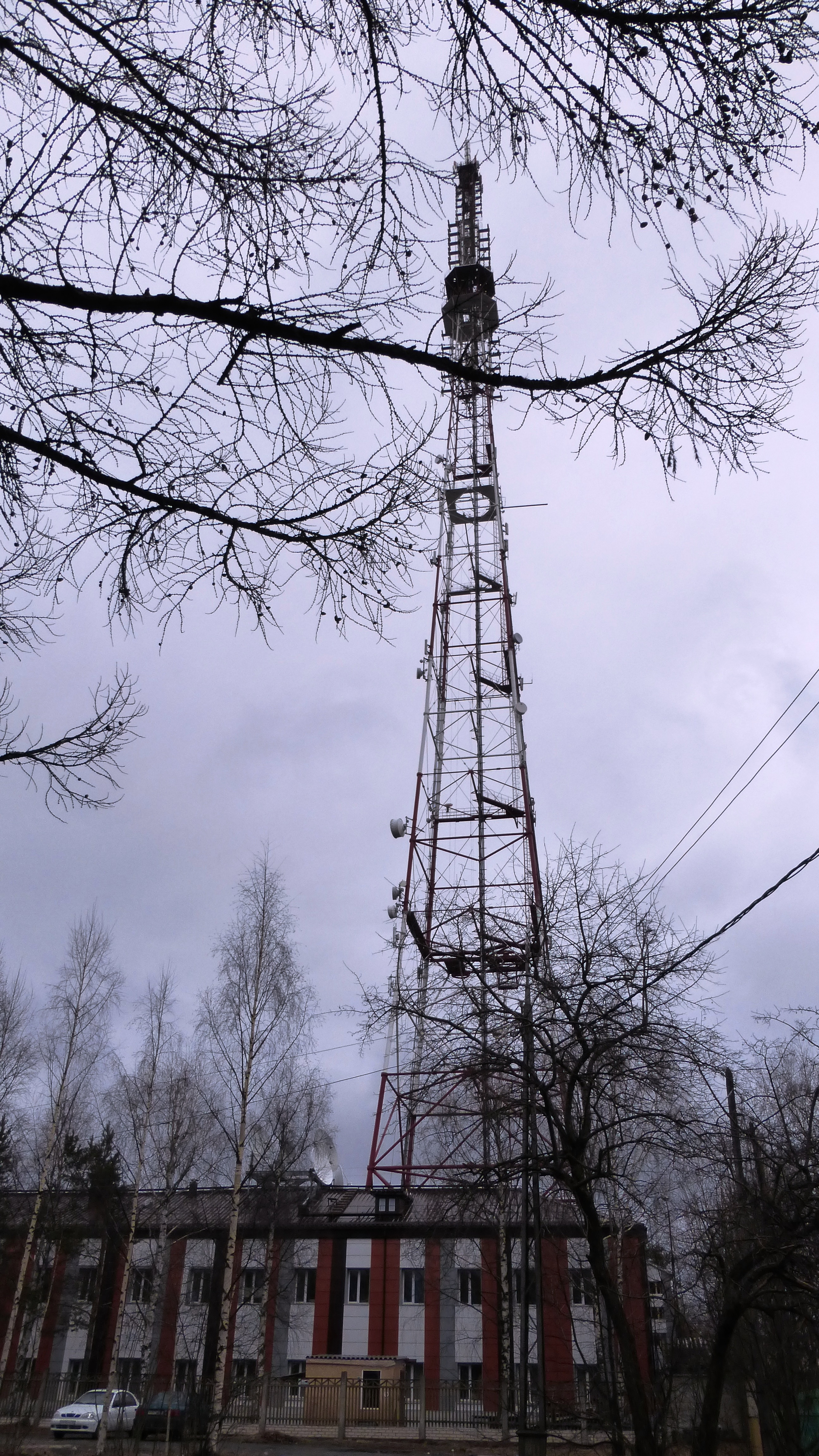 Телевизионная вышка (высота - 180 м) и здание телецентра в Петрозаводске. Введены в строй 29 апреля 1959 года.